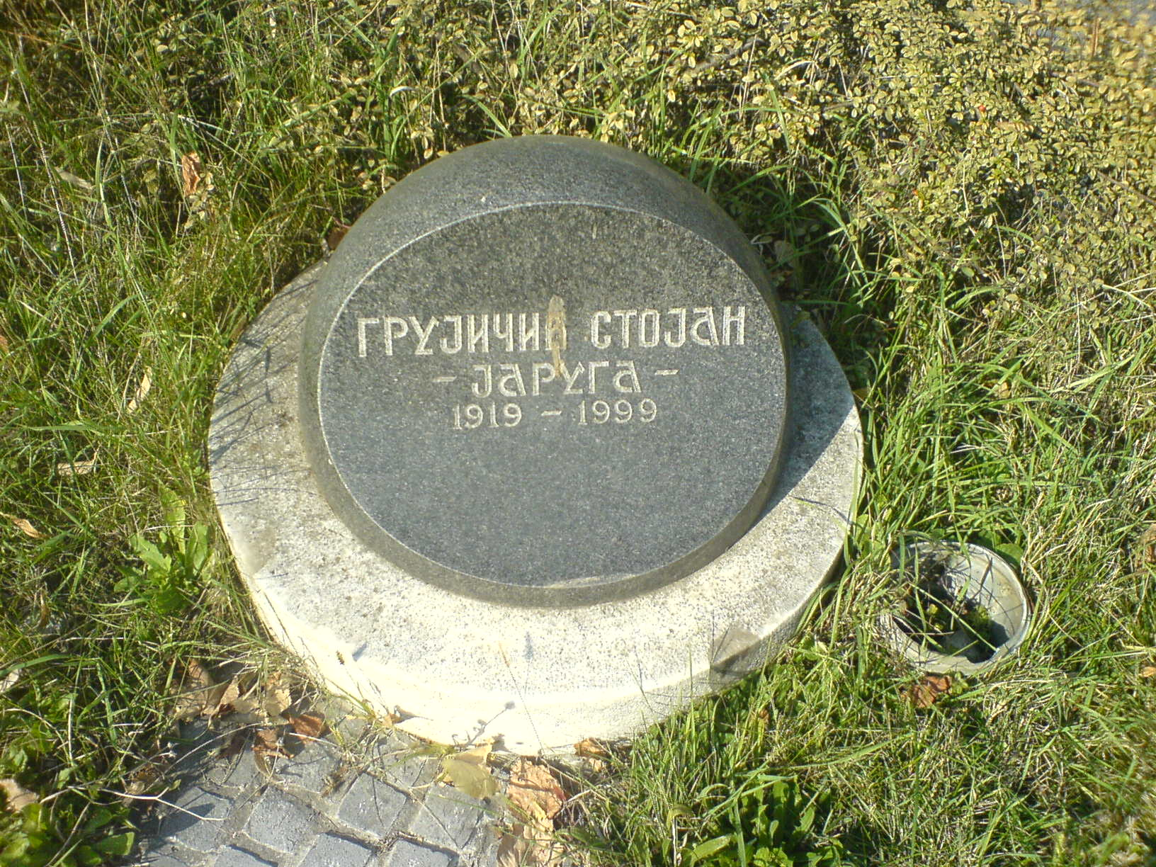 Grob Stojana Grujičića.